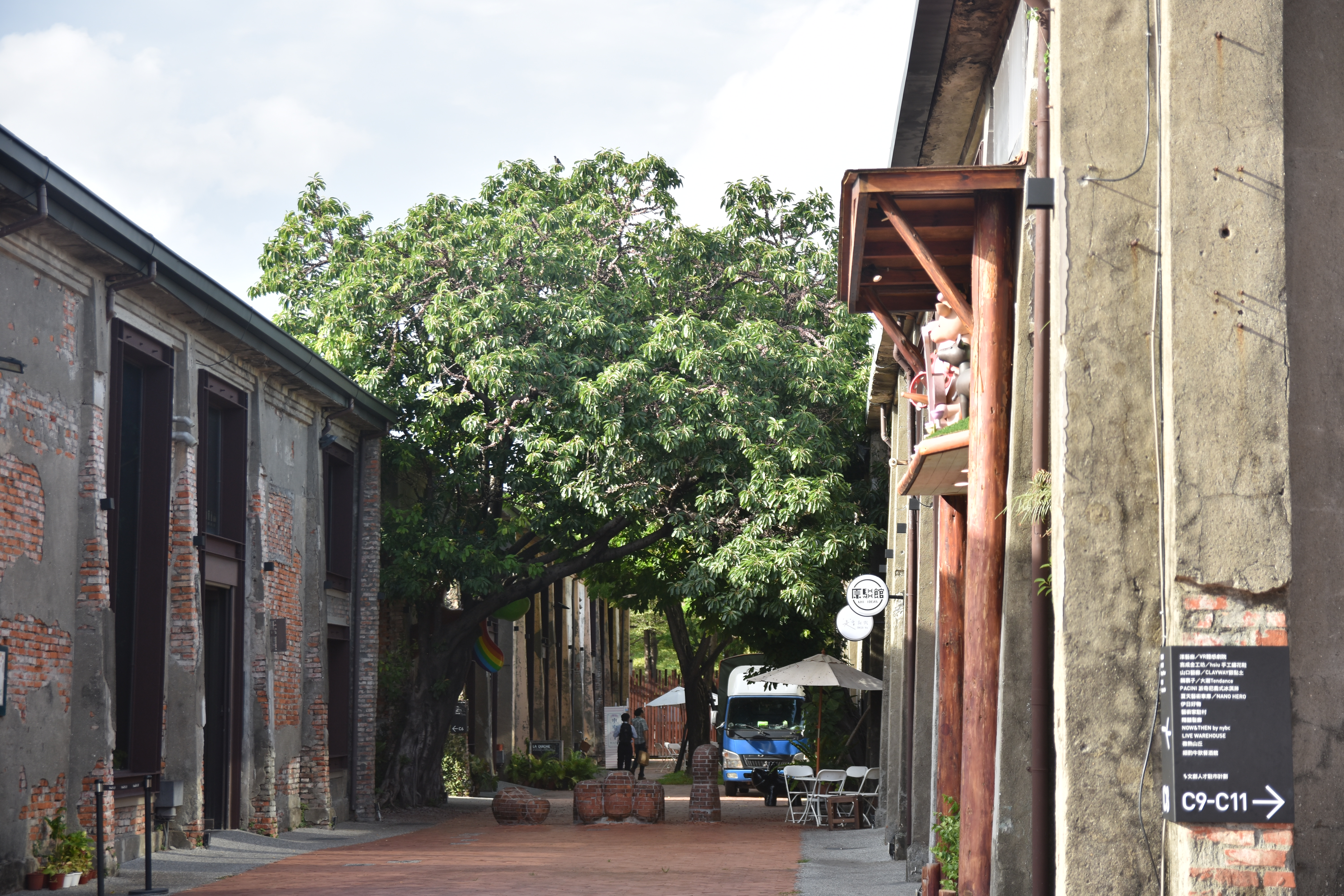 中文（台灣）: 駁二藝術特區